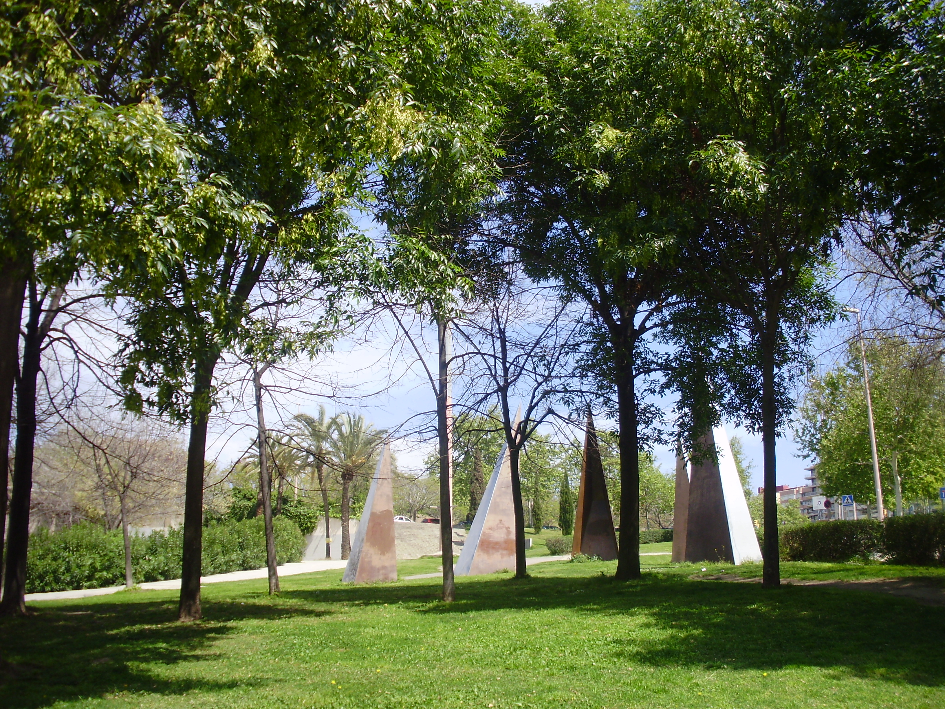 arbres i gespa als jardins dedicats a la memòria de la activista anarquista Àurea Cuadrado.